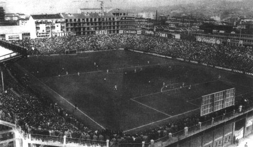 Inaugurazione dello Stadio Filadelfia. Foto dell'epoca. Il conte Marone di Cinzano, la principessa Maria Adelaide, il Duca d'Aosta